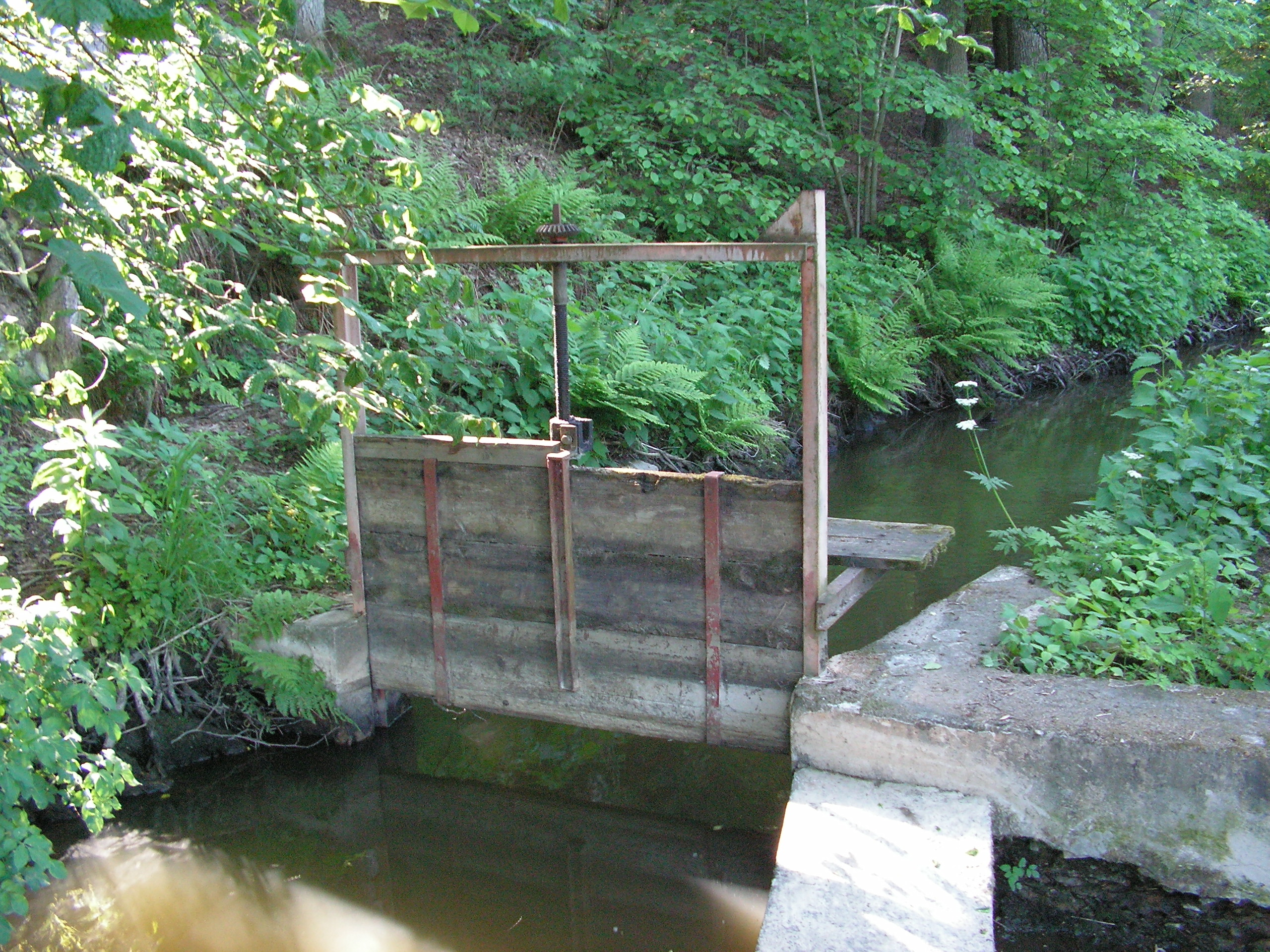 Stavidlo u jezu na Pstružném potoce (přítok Sázavy).